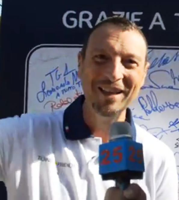 Foto del conduttore televisivo italiano Amadeus. L'immagine deriva da ritaglio di fermo immagine d'intervista del 2014.